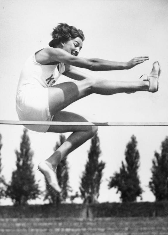 Hochspringerin Elfriede Kaun Scherl- Schirmer Sportbild Die junge Kielerin Elfriede Kaun. Bei den Olympiaprüfungen in Wuppertal stellte sie mit 1,60 m einen neuen deutschen Rekord im Hochsprung auf. 7411-36 [1936] Abgebildete Personen: Kaun, Elfriede: Hochspringerin, Deutschland